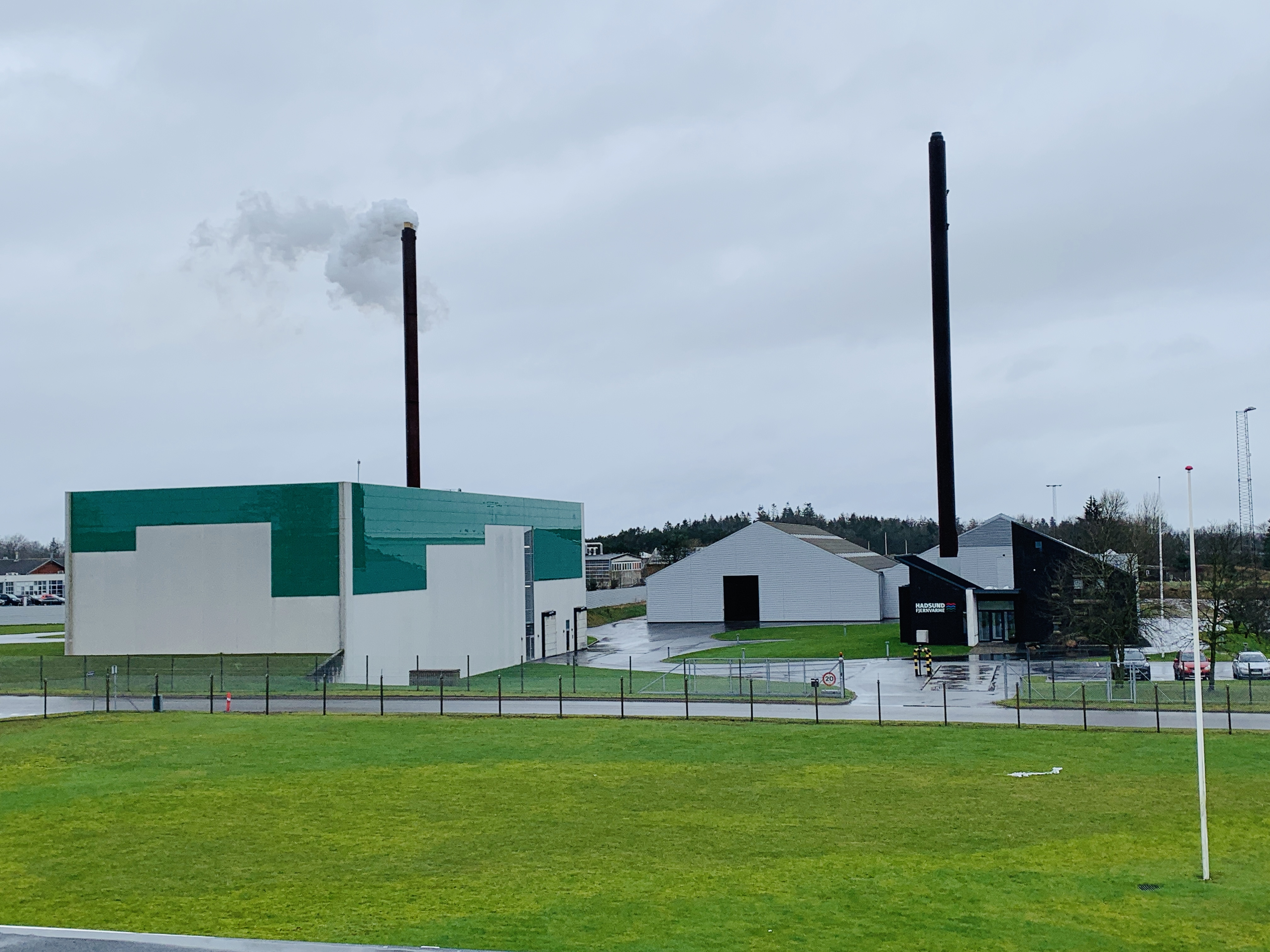 Hadsund Fjernvarme i 2020